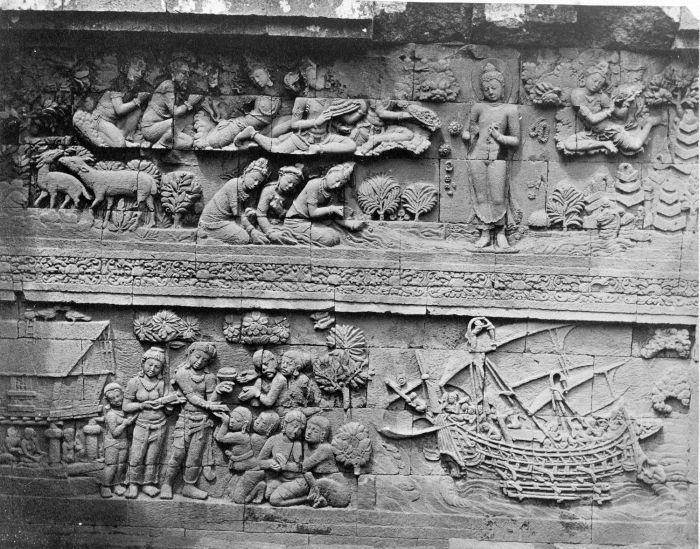 Foto. Relief di Candi Borobudur. Perahu/kapal bercadik menunjukkan ciri khas pelaut dari Nusantara.